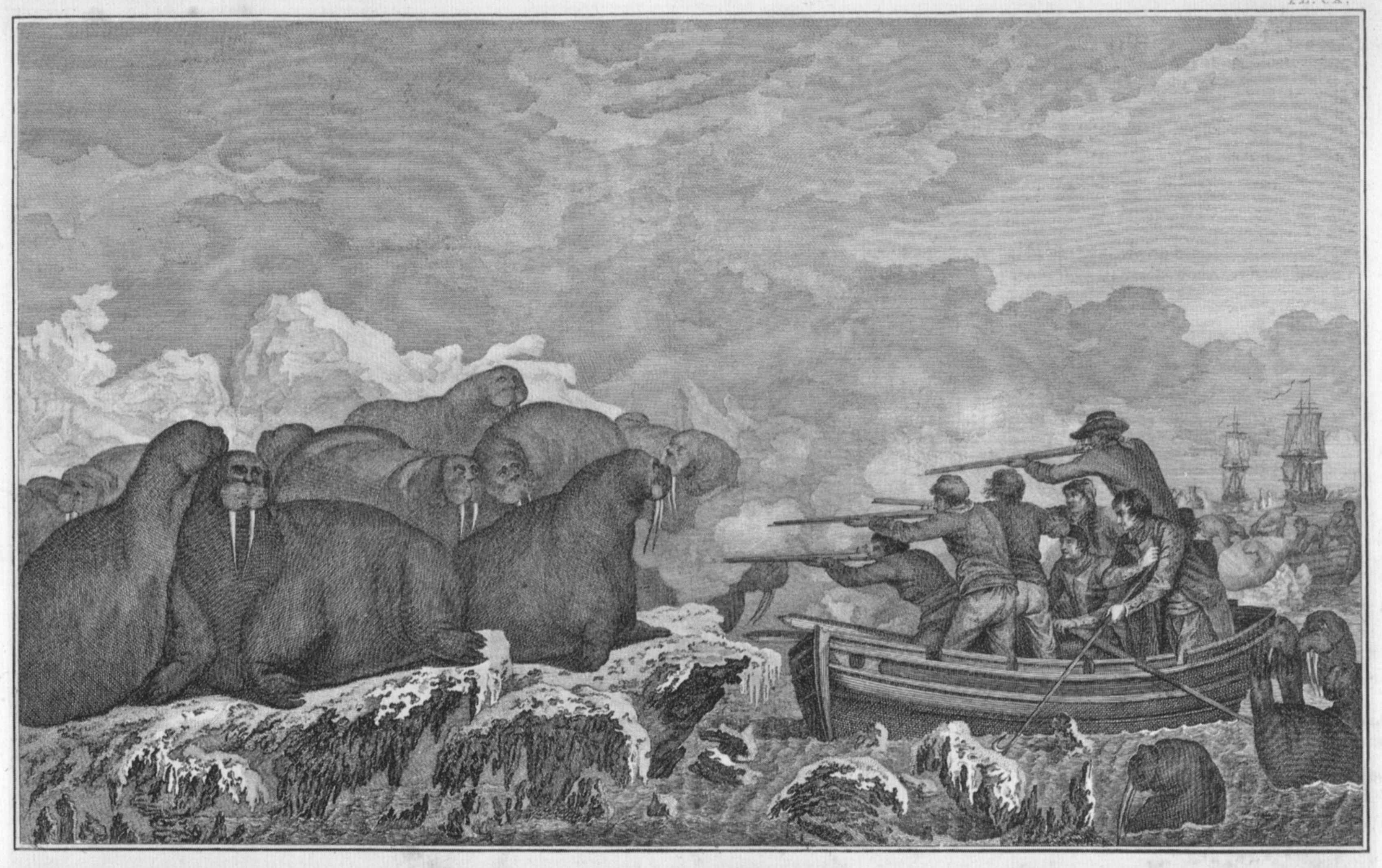 Walrossjagd, Radierung um 1748